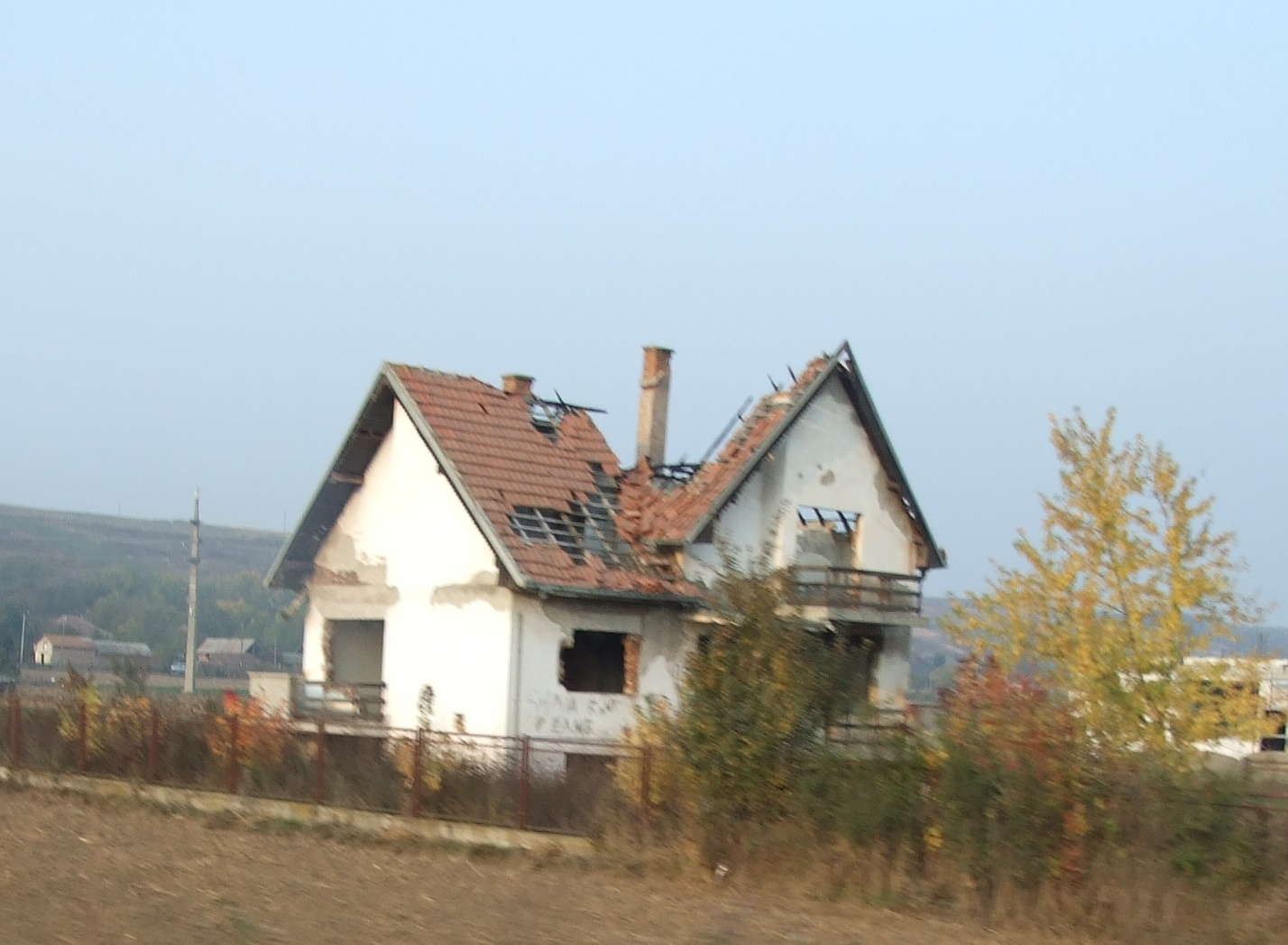 Porušena kuća Živorada Igića ispred Babinog Mosta